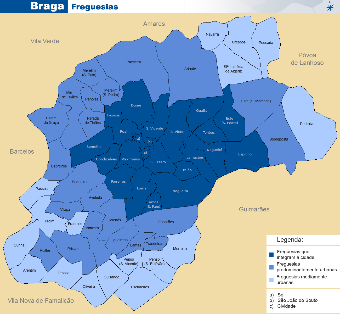 Mapa das Freguesias Bracarenses.